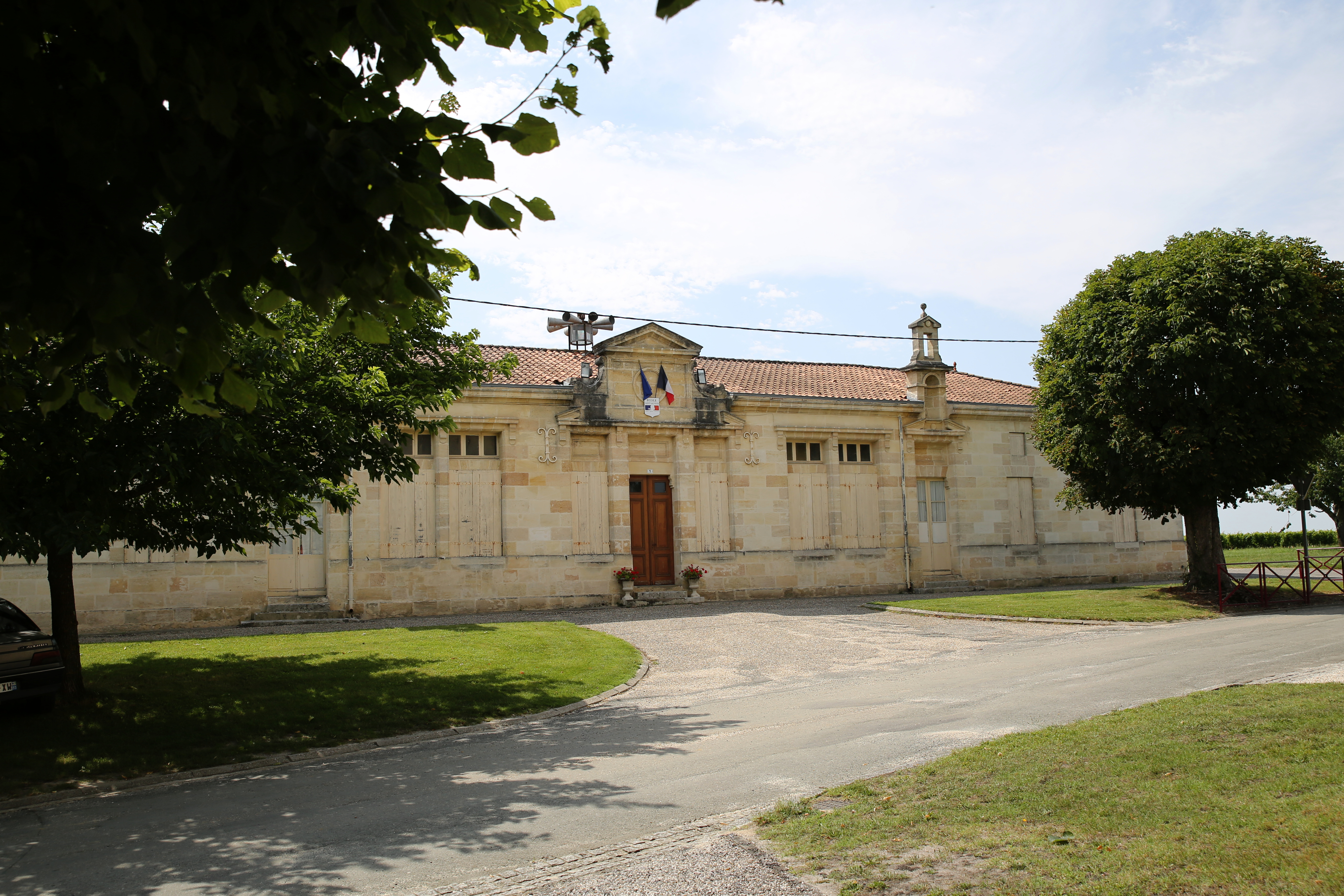 Mairie de Saint-Sauveur (33)